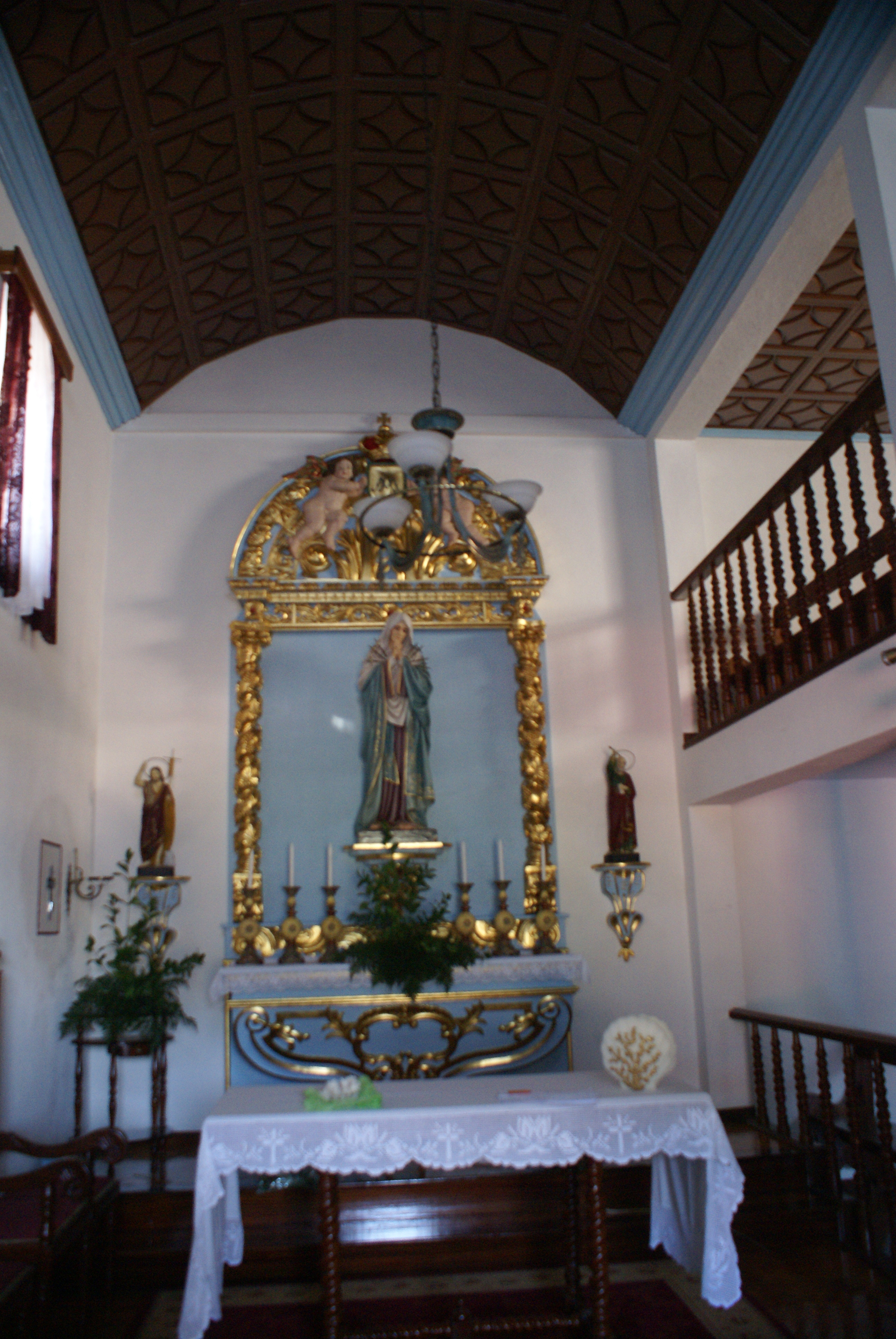 Igreja de Nossa Senhora das Dores, Fajã do Ouvidor, altar, Norte Grande, Velas, Ilha de São Jorge, Açores